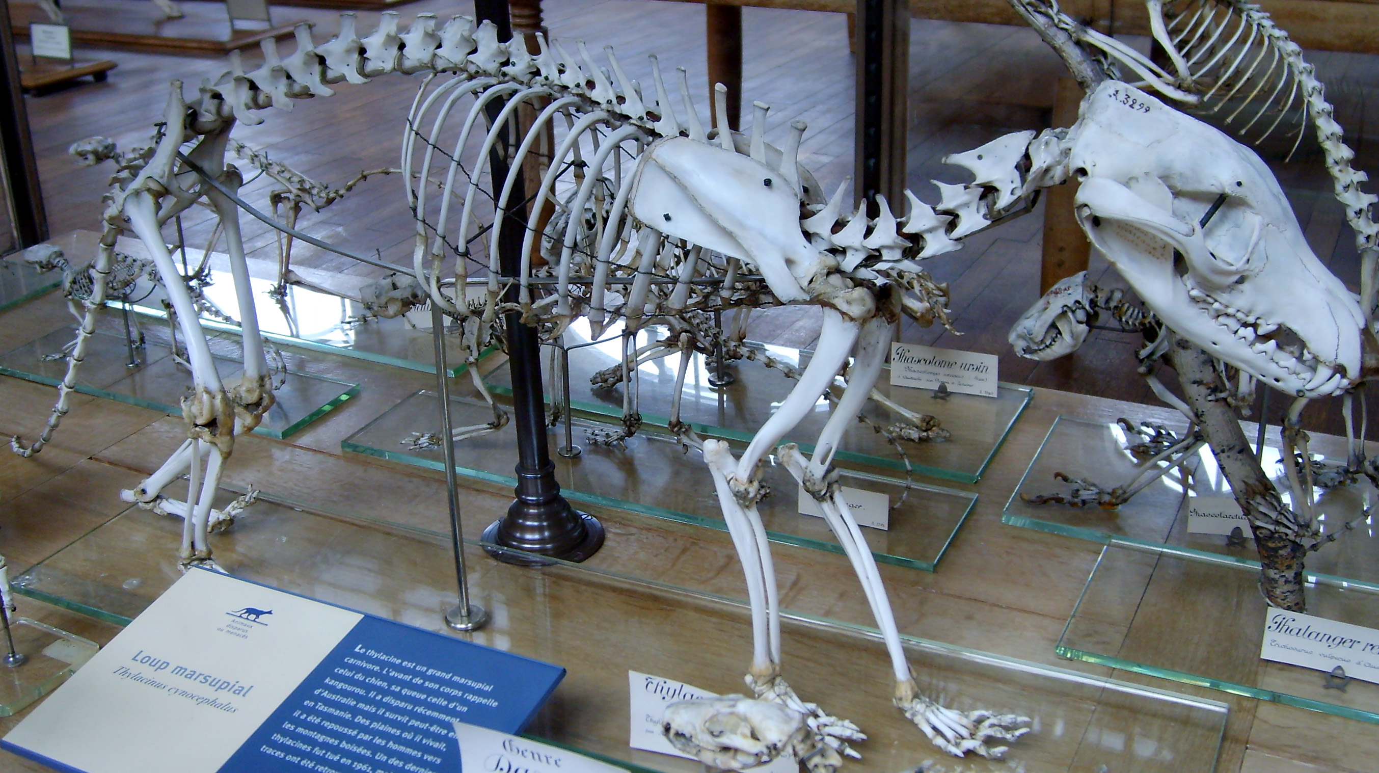 Thylacinus cynocephalus (Thylacine) skeleton, Muséum national d'histoire naturelle, Paris.